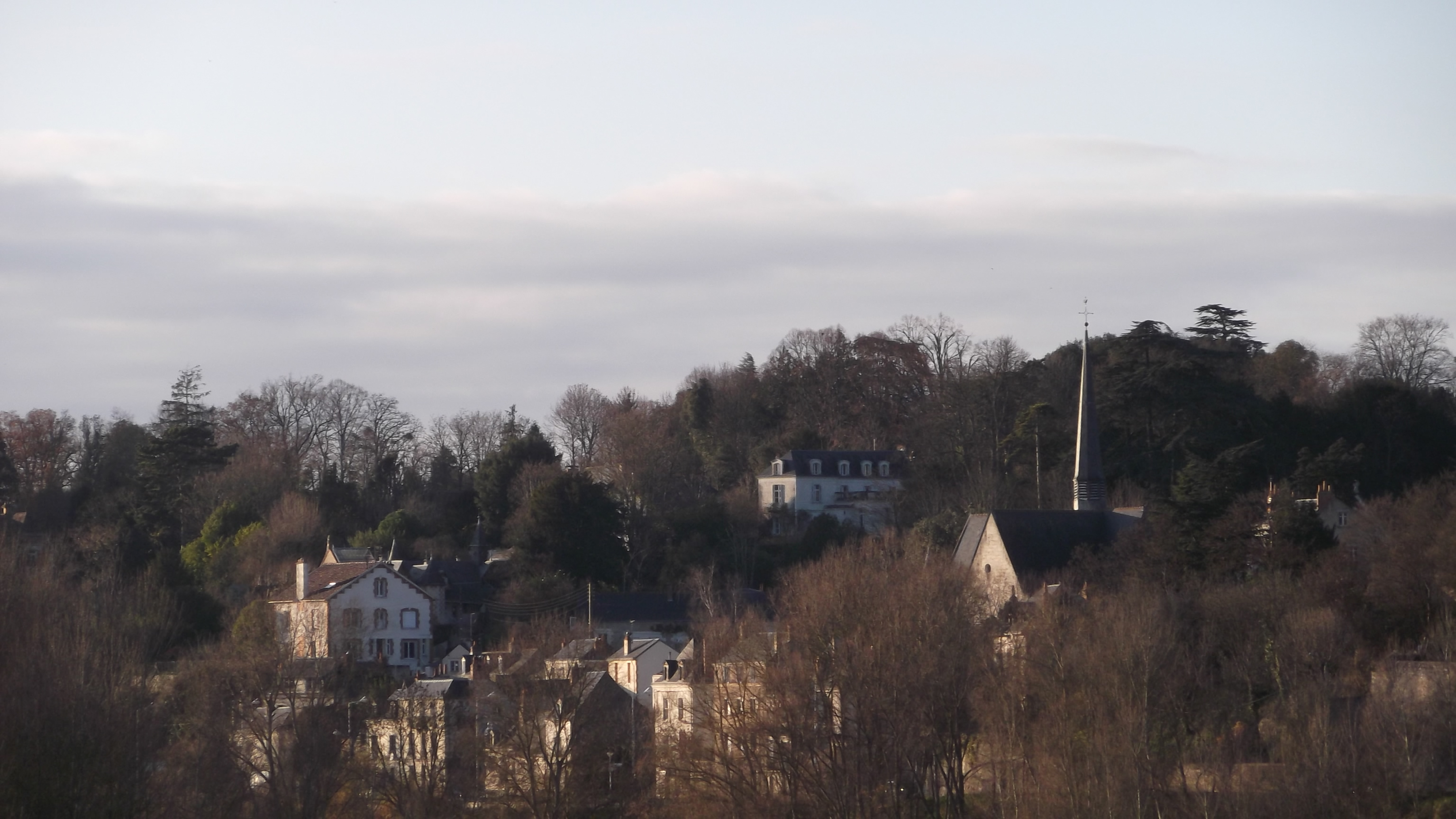 Vue panoramique de Saint-Cyr-sur-Loire